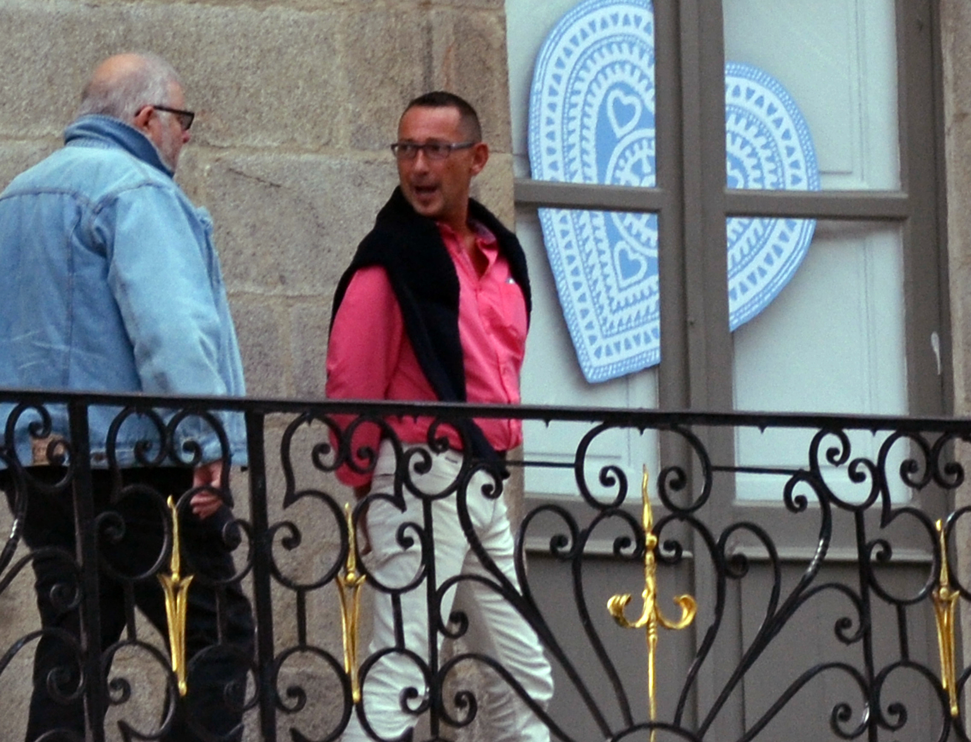 Pascal Jaouen, accompagné d'Yvon Etienne, lors de l'élection de la Reine de Cornouaille à Quimper le 28 juillet 2013.